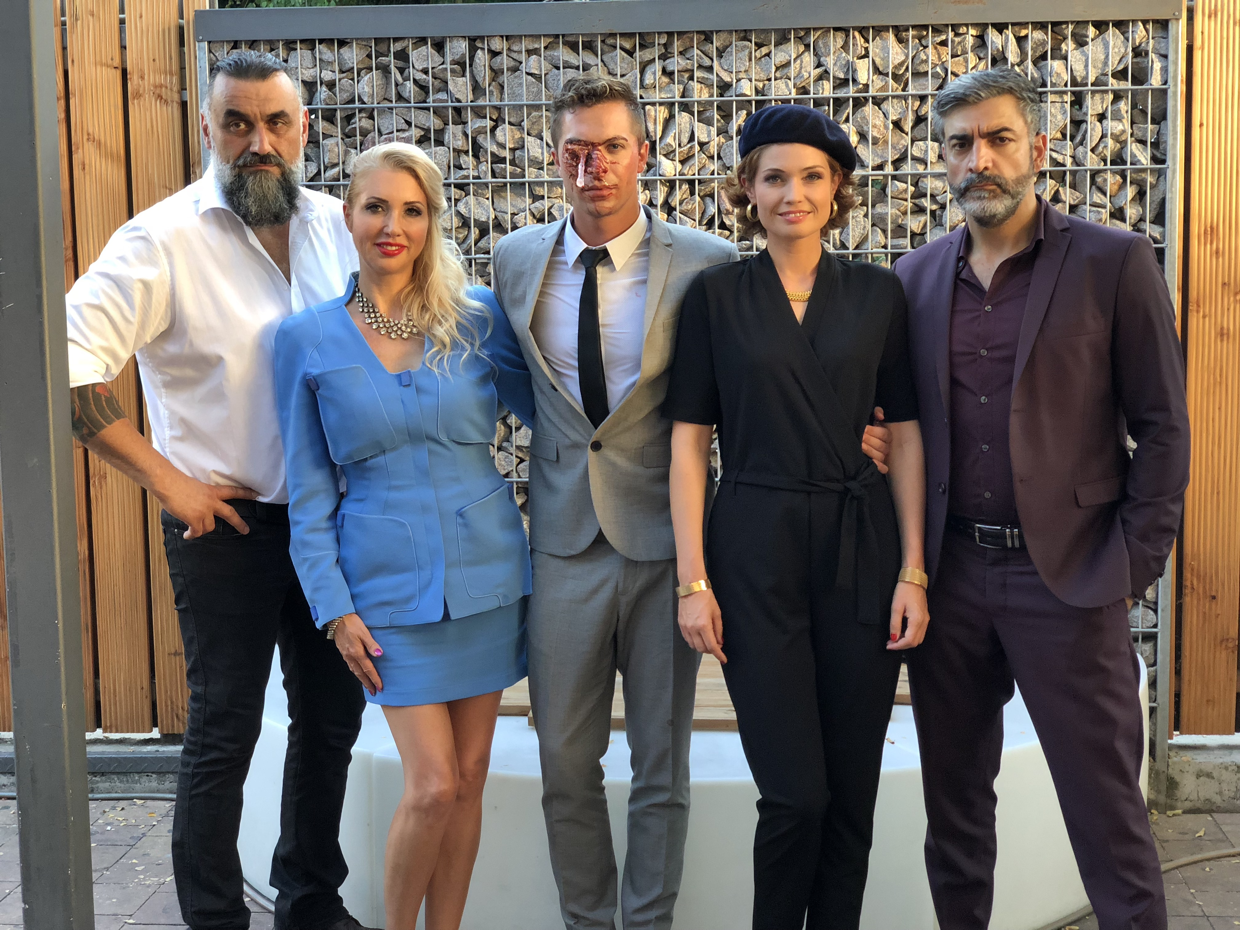 George Liratsis während einer Drehpause der Webserie Patchwork Gangsta meinsam mit seinen Schauspielkollegen Daniela Reimchen, Julian David, Siri Nase und Neil Malik Abdullah.